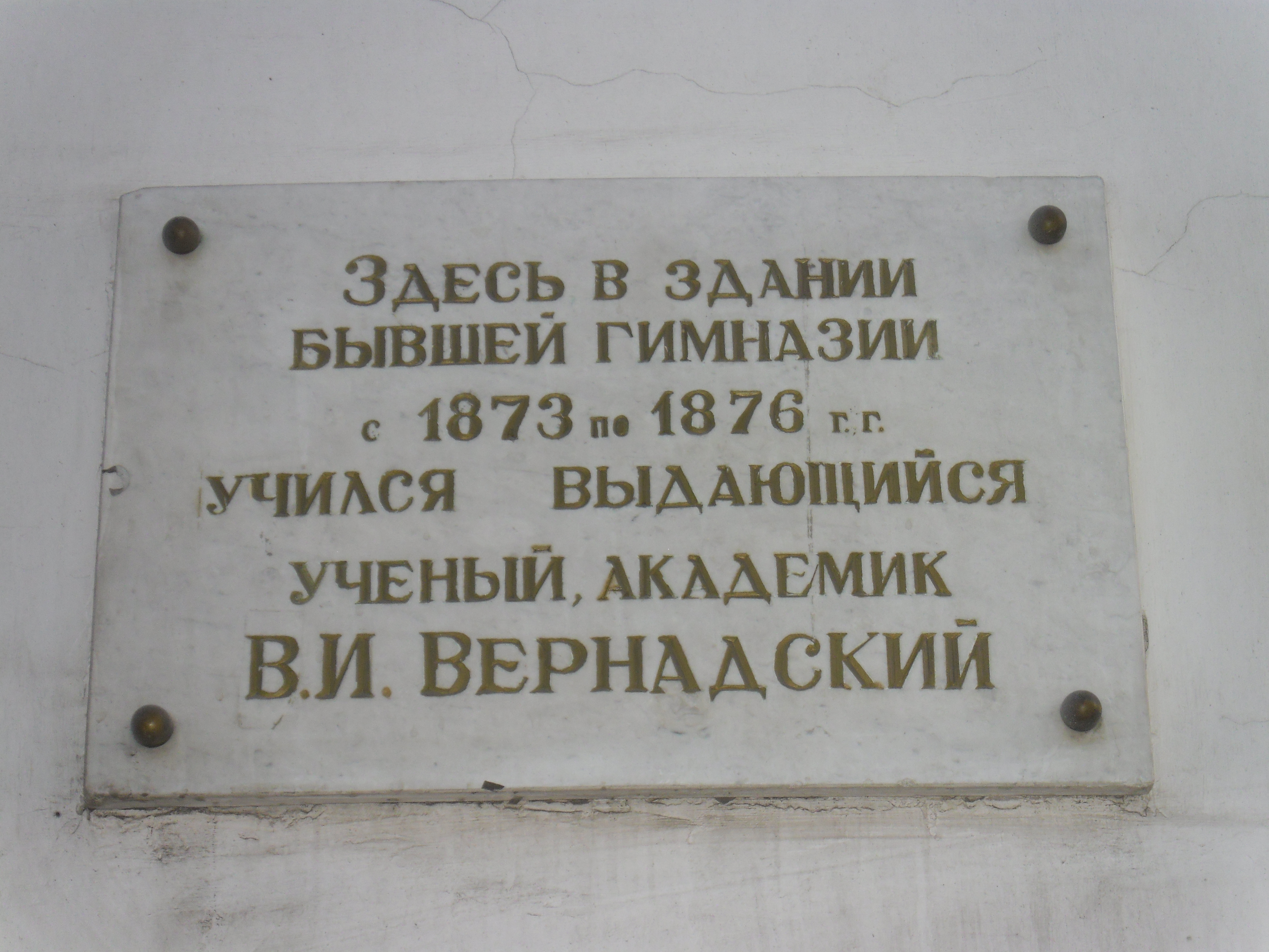 Харків. Будинок 1-ї чоловічої гімназії, меморіальна дошка